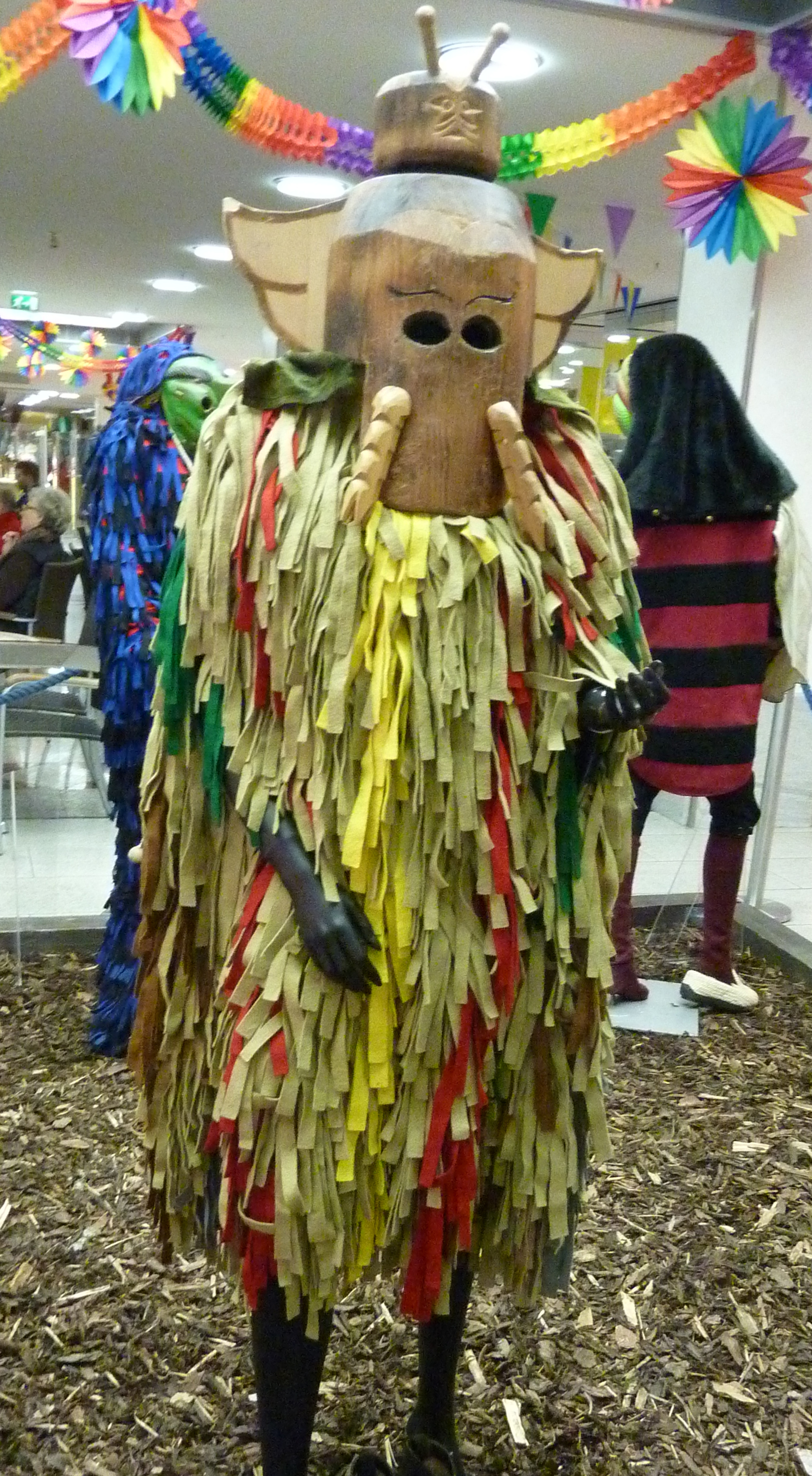 Houmock - Häsfigur des Narrenvereins Houmock e.V. in Wagshurst. Exponat aus der Sammlung Peter Scharte aus der Ortenau, vom 14. Januar bis 13. Februar 2013 im Einkaufszentrum Schwarzwald City (Freiburg) unter dem Titel „Narrenrequisiten - vielfältig und kreativ“ ausgestellt.